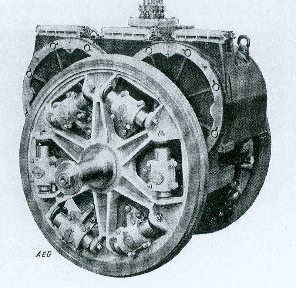 Werkfoto einer Antriebsachse der E 21.0